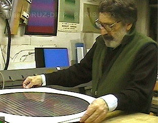 Portrait de Carlos Cruz-Díez